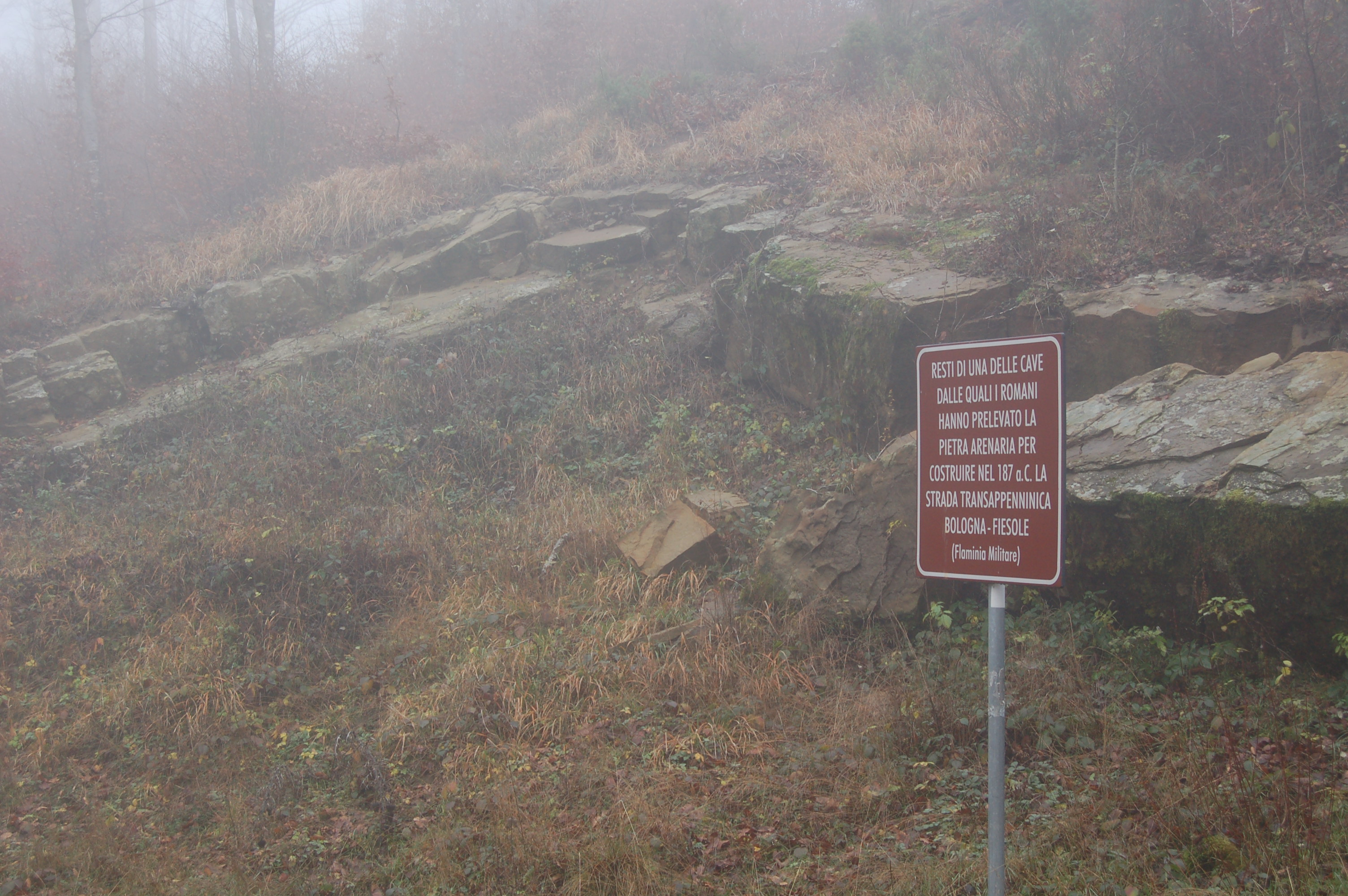 Antica cava di pietra usata nel 187 AC dai legionari romani per lastricare la Via Flaminia Minor, nei pressi di Pian di Balestra, appennino Bolognese, a pochi metri dalla via medesima. Autore Sandro Baldi, fotocamera Nikon D50 con ottica standard, scatto eseguito il 27/11/2006.